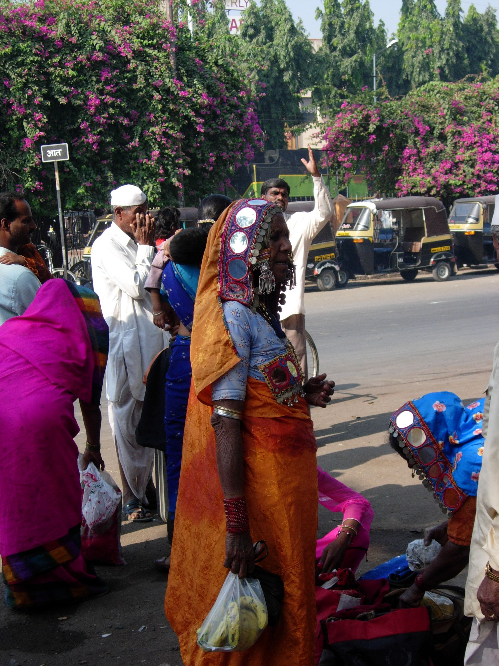 Lambani women, Bijapur, India.